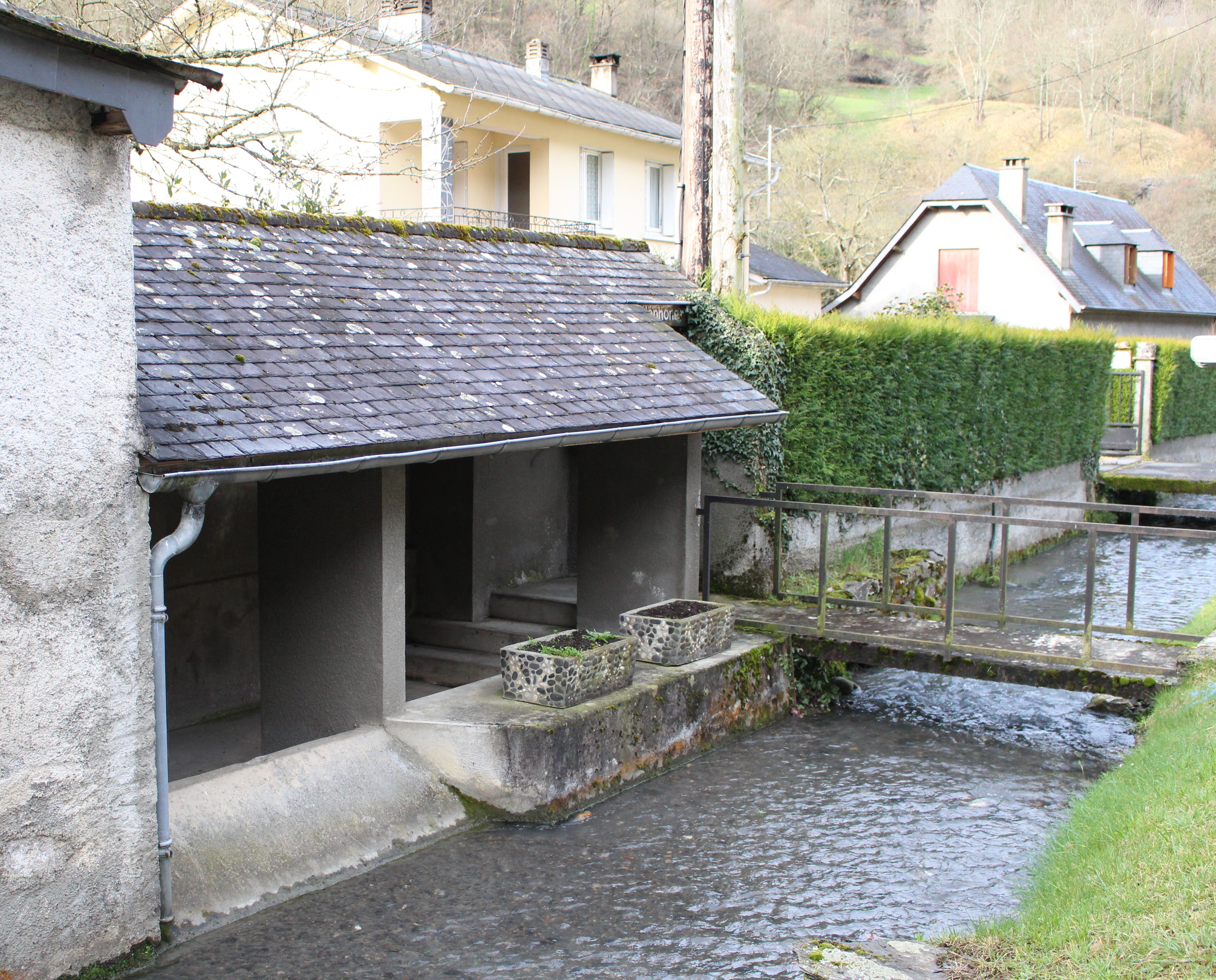 Lavoir de Saint-Créac (Hautes-Pyrénées)